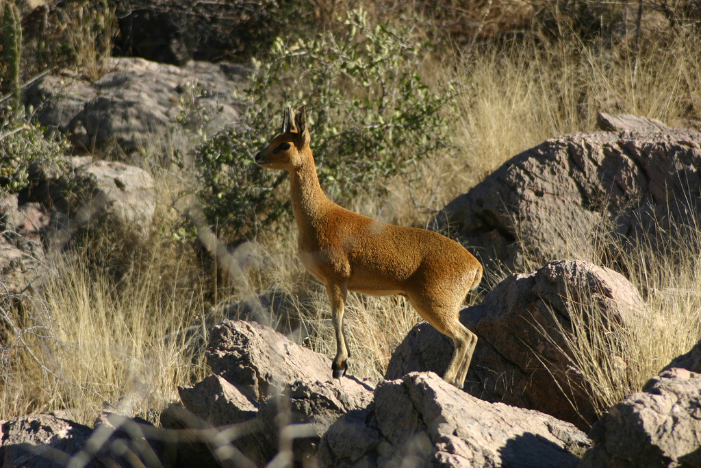 Location: Namibia